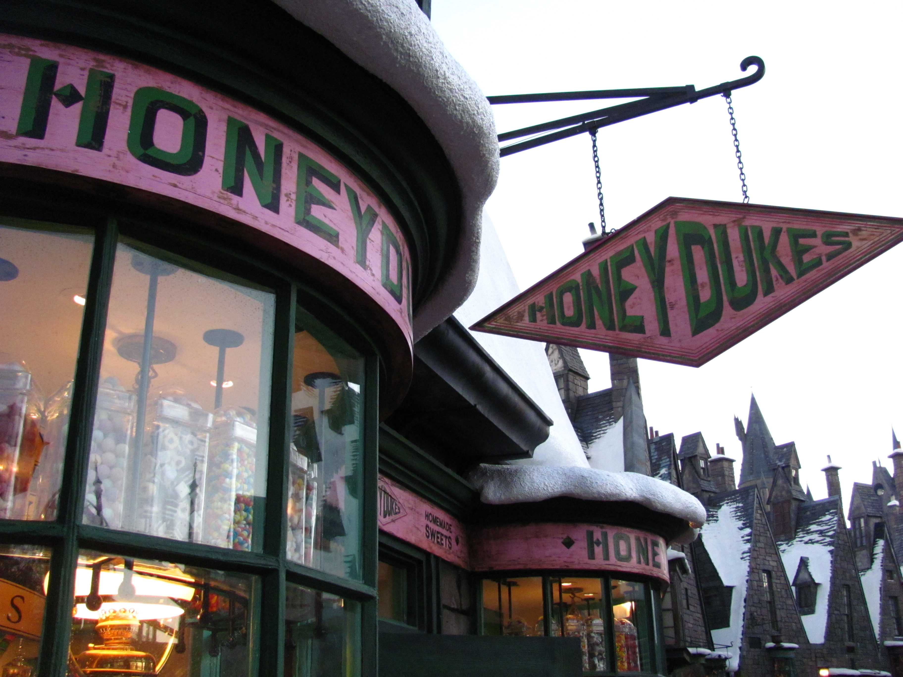 Honeyduke's